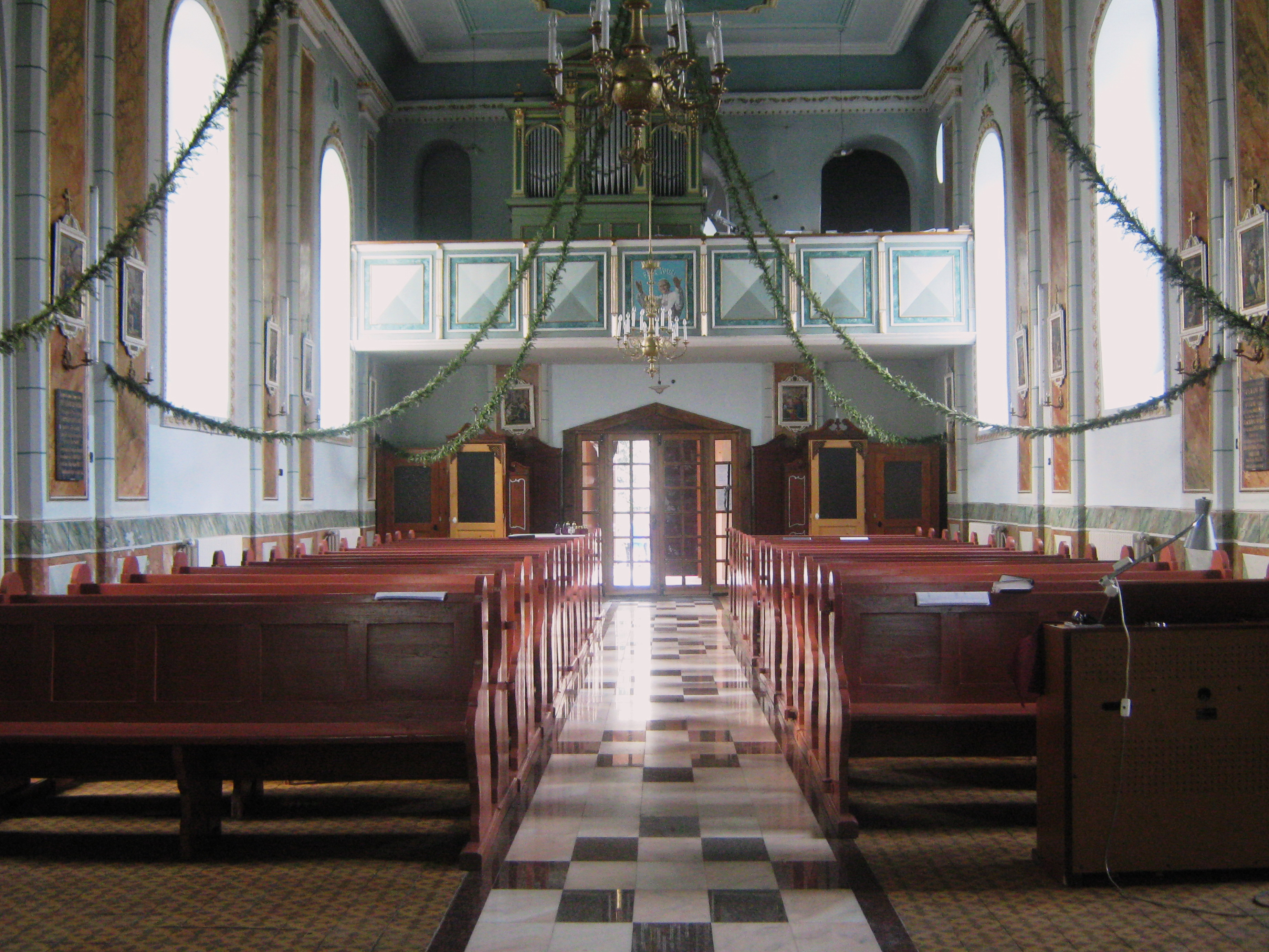 Interiorul Bisericii Romano-Catolice Gura Humorului